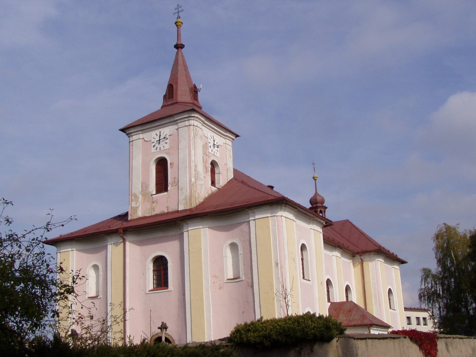 Kostel sv. Bartoloměje (Bystré v Orl. horách)